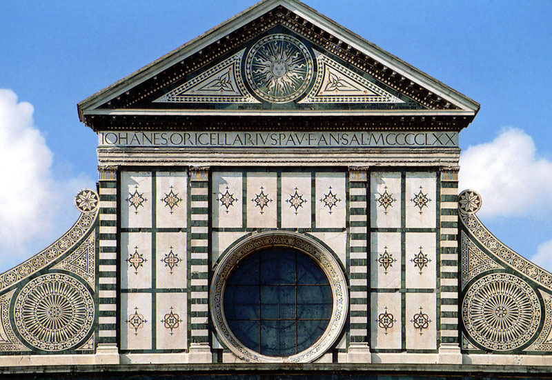 Santa Maria Novella, Firenze (Italia). Leonbattista Alberti, completed 1470.